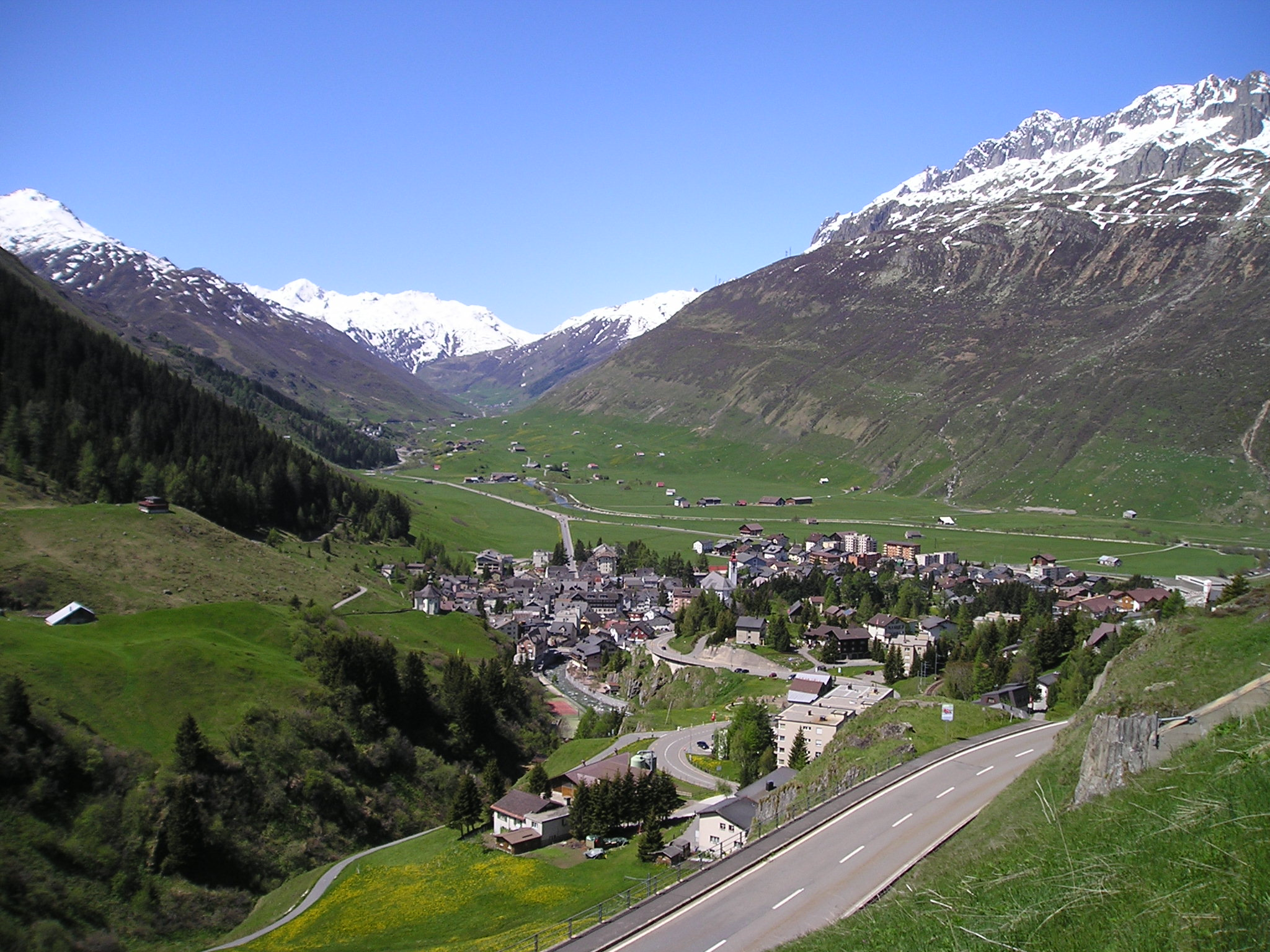 Andermatt von der Oberalppassstrasse. Blick nach Westen in Richtung Hospental und Realp. Ganz links der Pizzo d'Orsino (2660 m) mit dem Hochstock (2262 m) darunter, weit im Westen das Gross Muttenhorn (3099 m), davor die Stotzigen Firsten (2759 m) südlich des Furkapasses, davor der Schafberg (2591 m). Im Norden des Urserentals im Westen das Müeterlishorn (3066 m), der Spitzberg (2935 m) und ganz recht der Hinter Lochstock (2557 m).